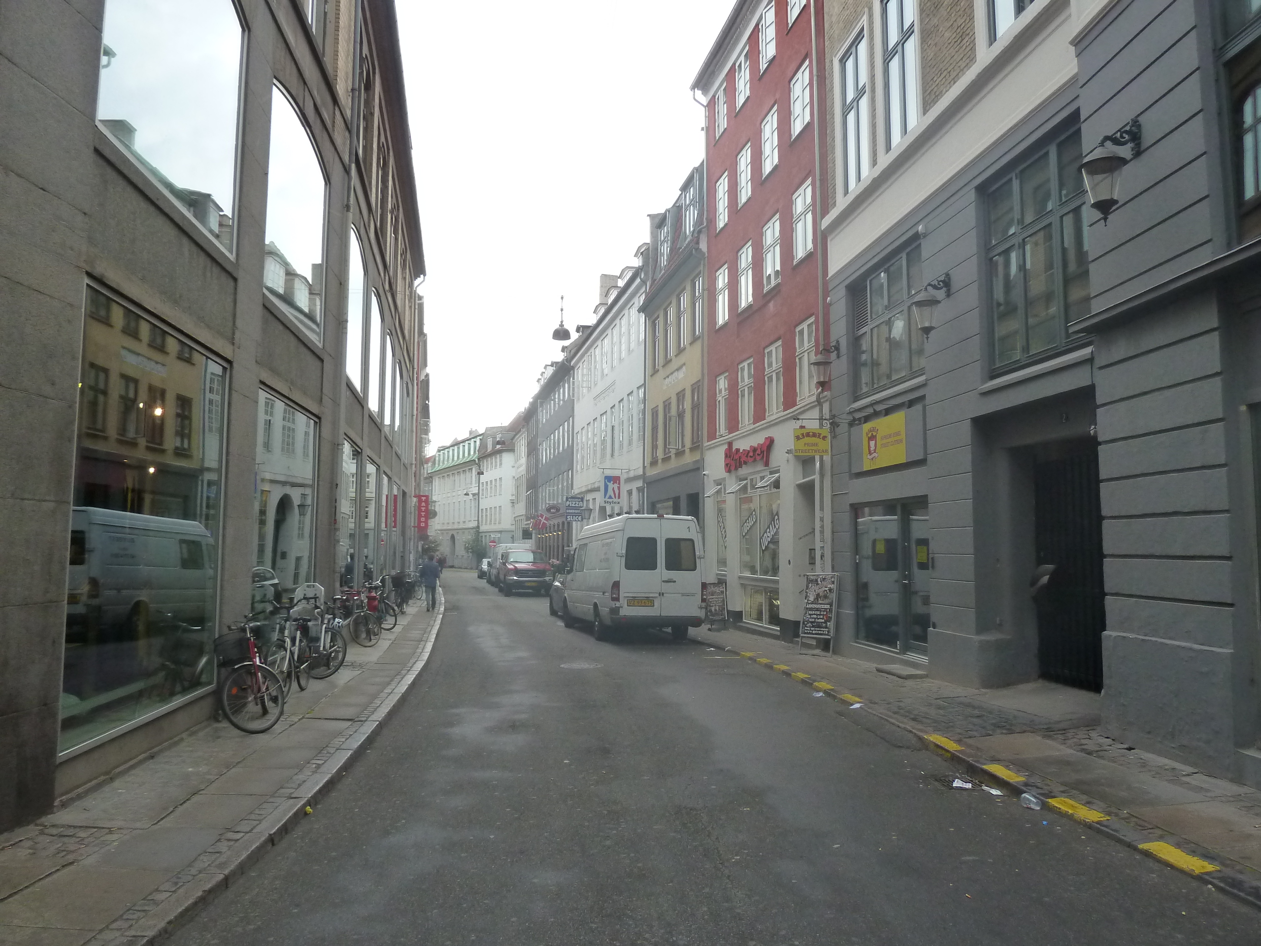 The street Badstuestræde in Indre By in Copenhagen.